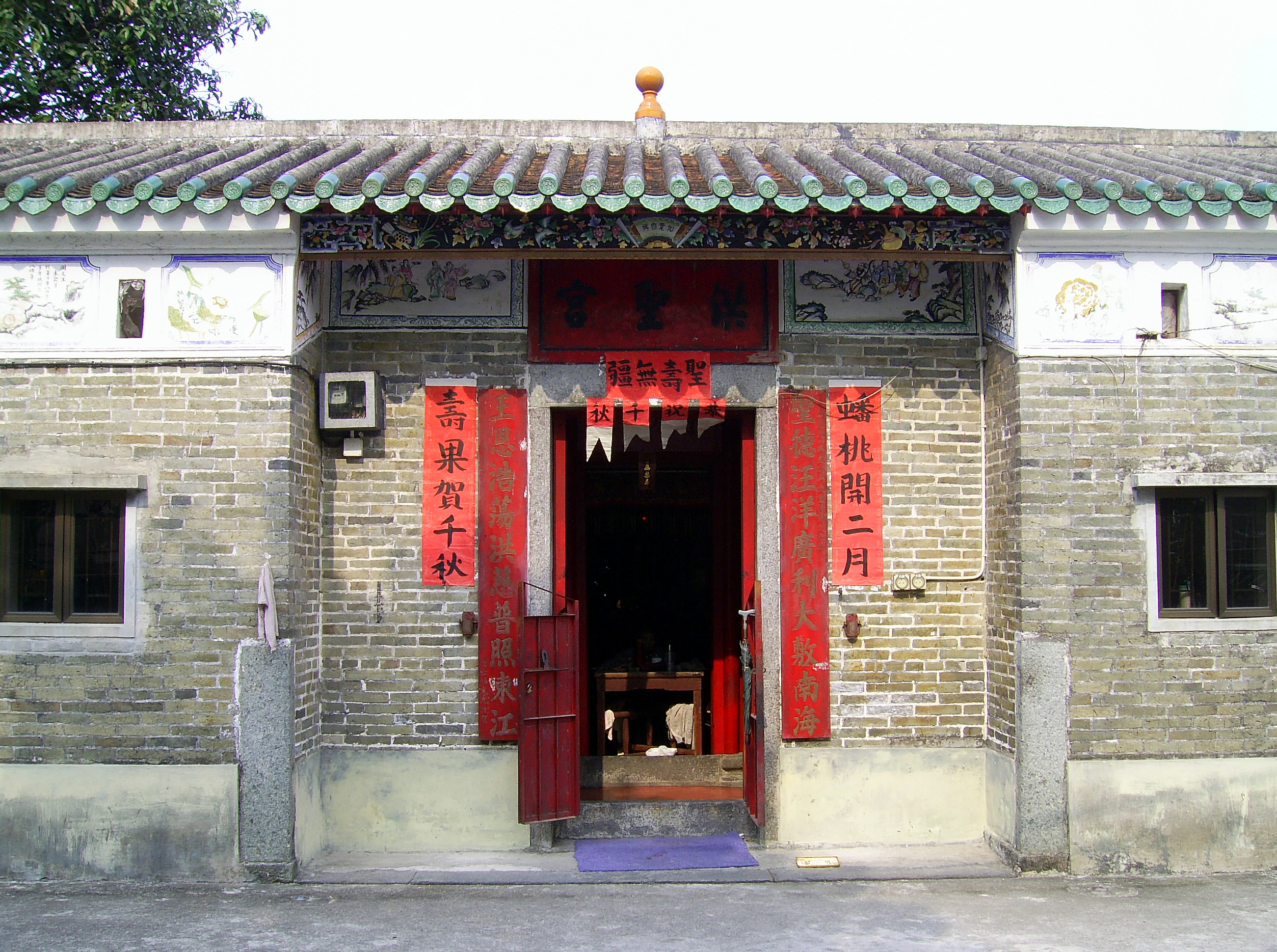 中文（香港）: 孔嶺洪聖廟 Hung Shing Temple located in Hung Leng, Fanling, Hong Kong